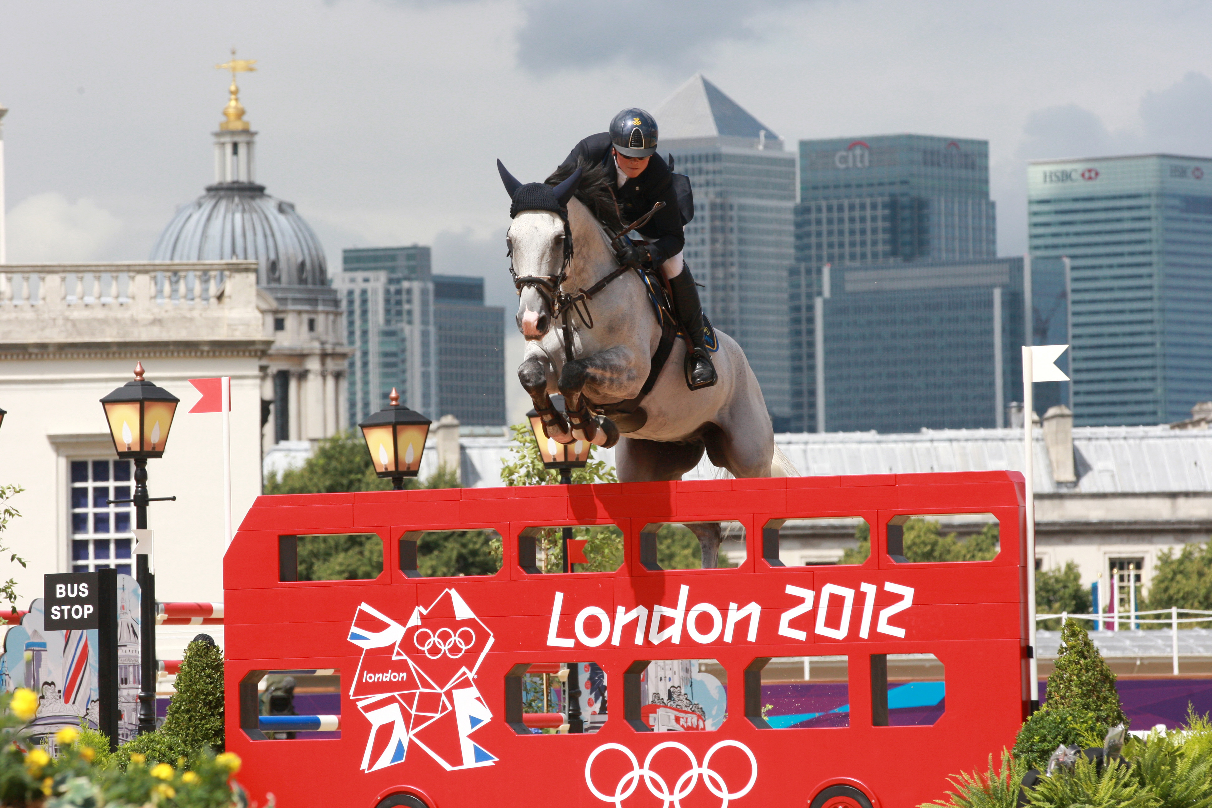 Lisen Bratt Fredricson och Matrix under Olympiska sommarspelen 2012